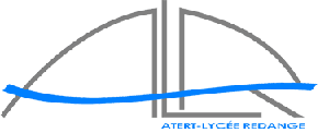 Den offiziellen Logo vum Atert Lycée. Hien gouf erschaaf vum Daniel Pannacci erschaaf.